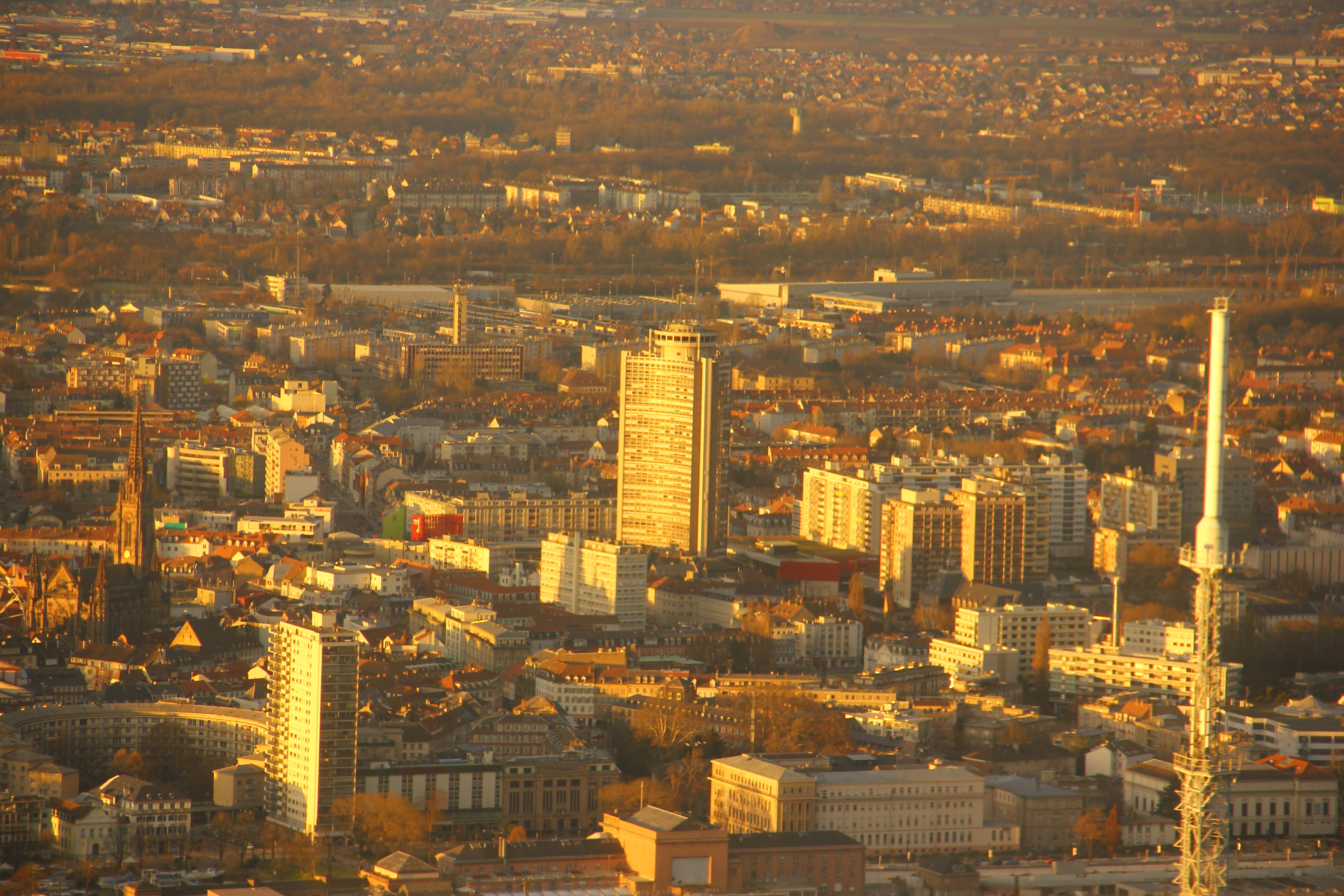 Mulhouse vu du ciel par coucher de soleil